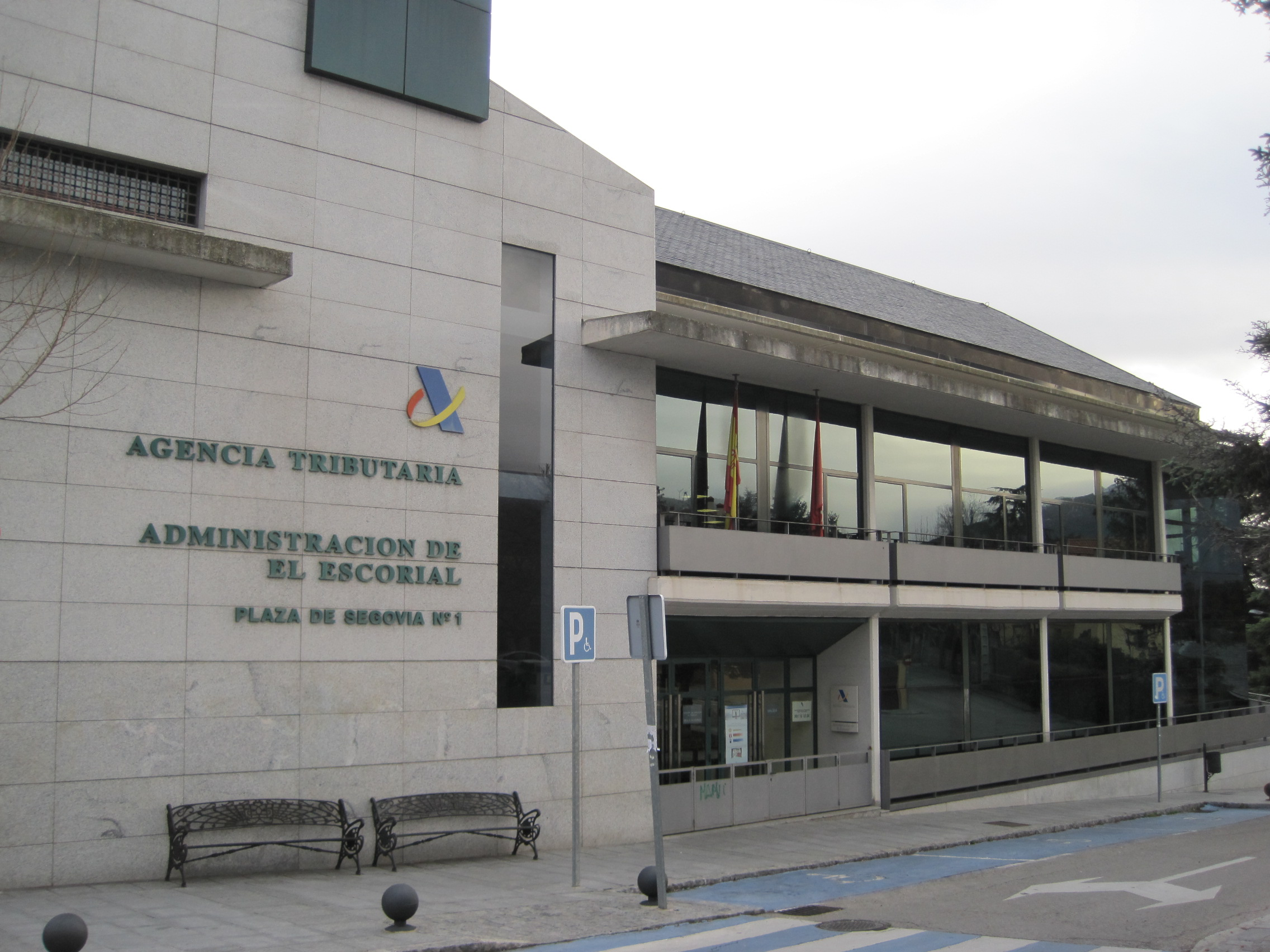 Sede de la Agencia Tributaria en El Escorial (Madrid, España).